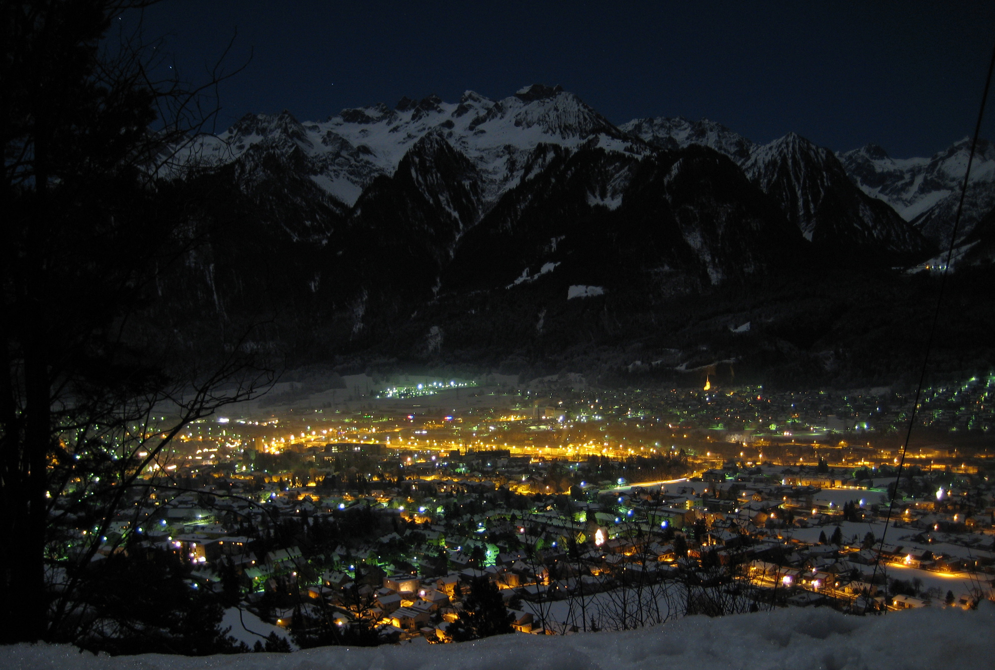 Überblick über die Stadt Bludenz (Vorarlberg / Österreich) bei Nacht.